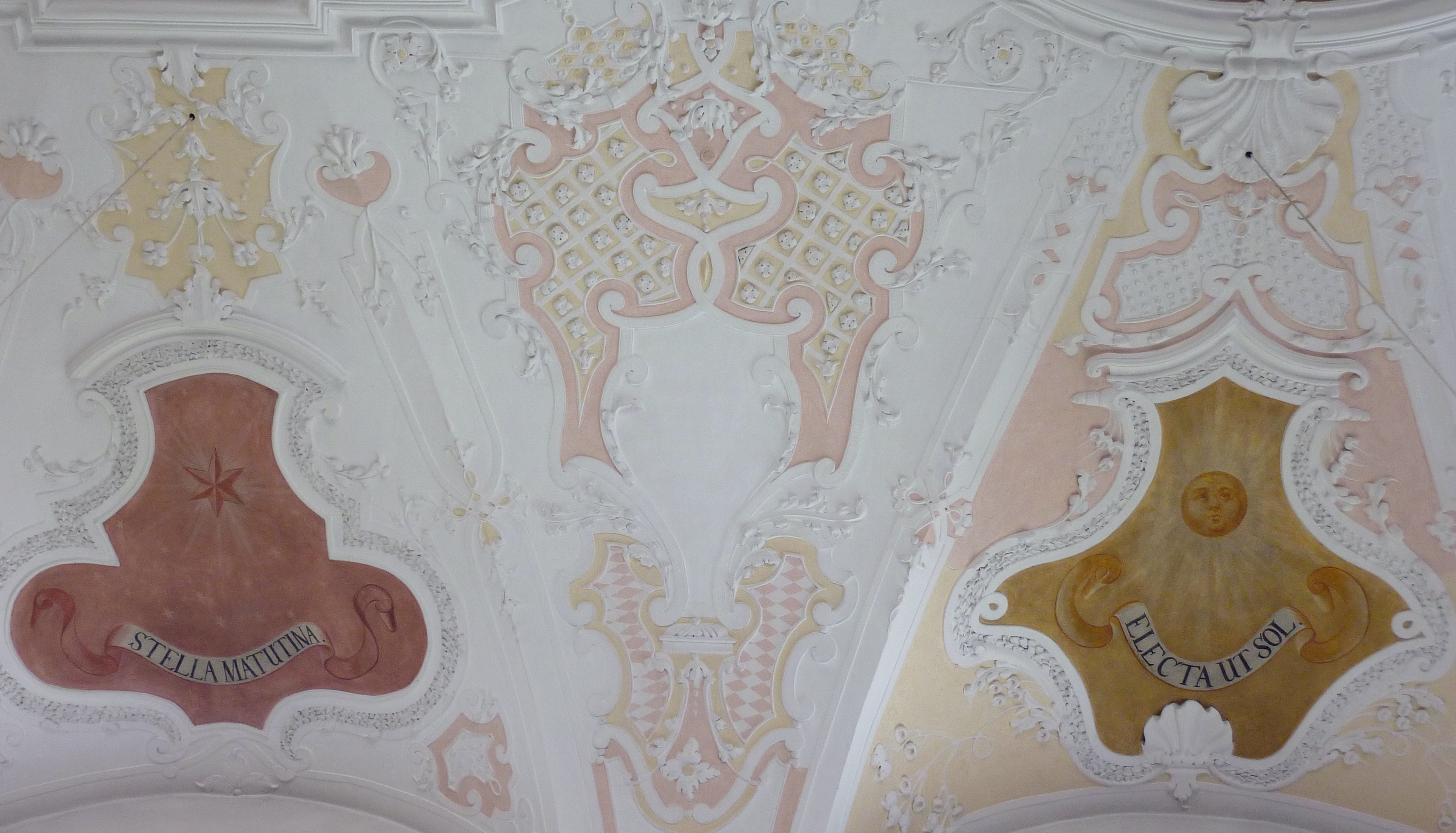 Katholische Pfarrkirche St. Maria Immaculata in Echenbrunn, einem Ortsteil von Gundelfingen im Landkreis Dillingen an der Donau (Bayern), Stuckdekor, Grisaillen in den Stichkappen mit Anrufungen Mariens nach der Lauretanischen Litanei, Inschrift: STELLA MATUTINA (Morgenstern), ELECTA UT SOL (auserlesen wie die Sonne)